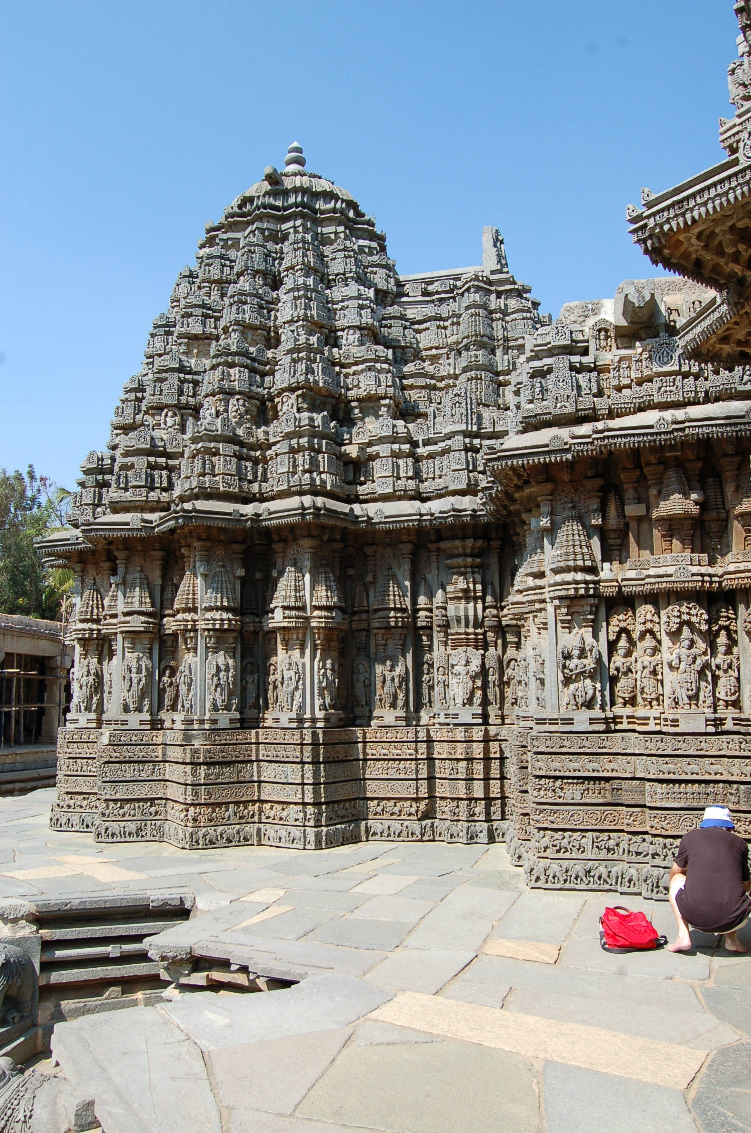 படம் எடுத்தவர்: செ.இரா. செல்வக்குமார் (C.R.Selvakumar). இதனை கிரியேட்டிவ் காமன்சு 3.0 என்னும் உரிமத்தின் கீழ் வழங்குகின்றேன். விளக்கம்: இந்தியாவில். கருநாடக மாநிலத்தில், சோமநாதபுரத்தில் உள்ள கேசவர் கோயிலின் ஒருபக்கத்தின் ஒளிப்படம். இக் கோயில் மூன்றாம் நரசிம்மன் காலத்தில் (கி.பி 1254-91) அவருடைய படைத்தலைவனாக இருந்த சோமநாத் என்பவரால் எழுப்பபட்டது. படம் எடுத்த காலம்: சனவரி 2010.